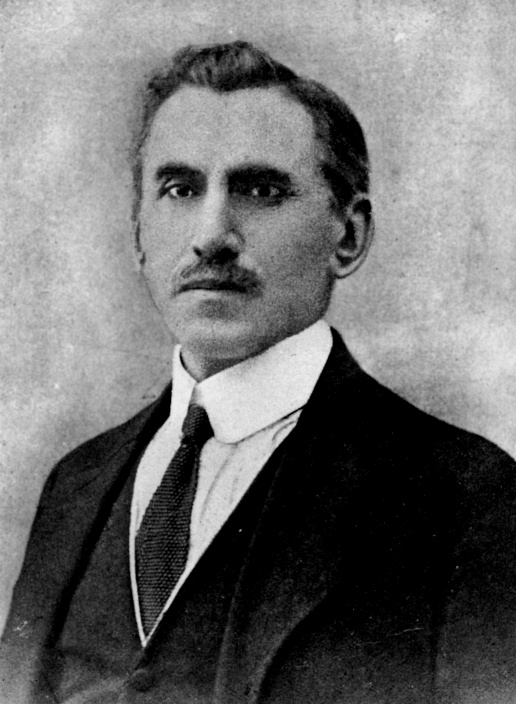 Фотография на проф. Иван Д. Шишманов. 20.III.1920 г.